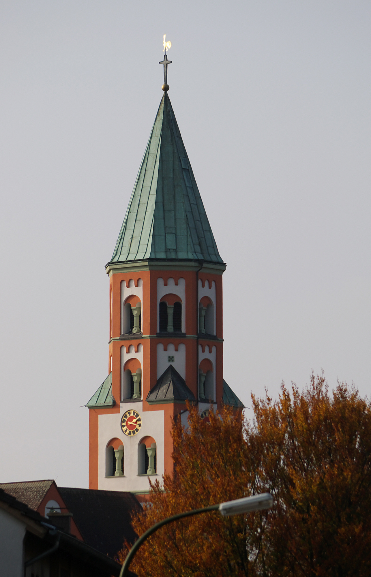 Turm der denkmalgeschützten Katholischen Kirche Herz Jesu in Kamen-Heeren, Nordrhein-Westfalen, Deutschland.